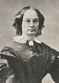 Charlotta Deland (1807-1864)